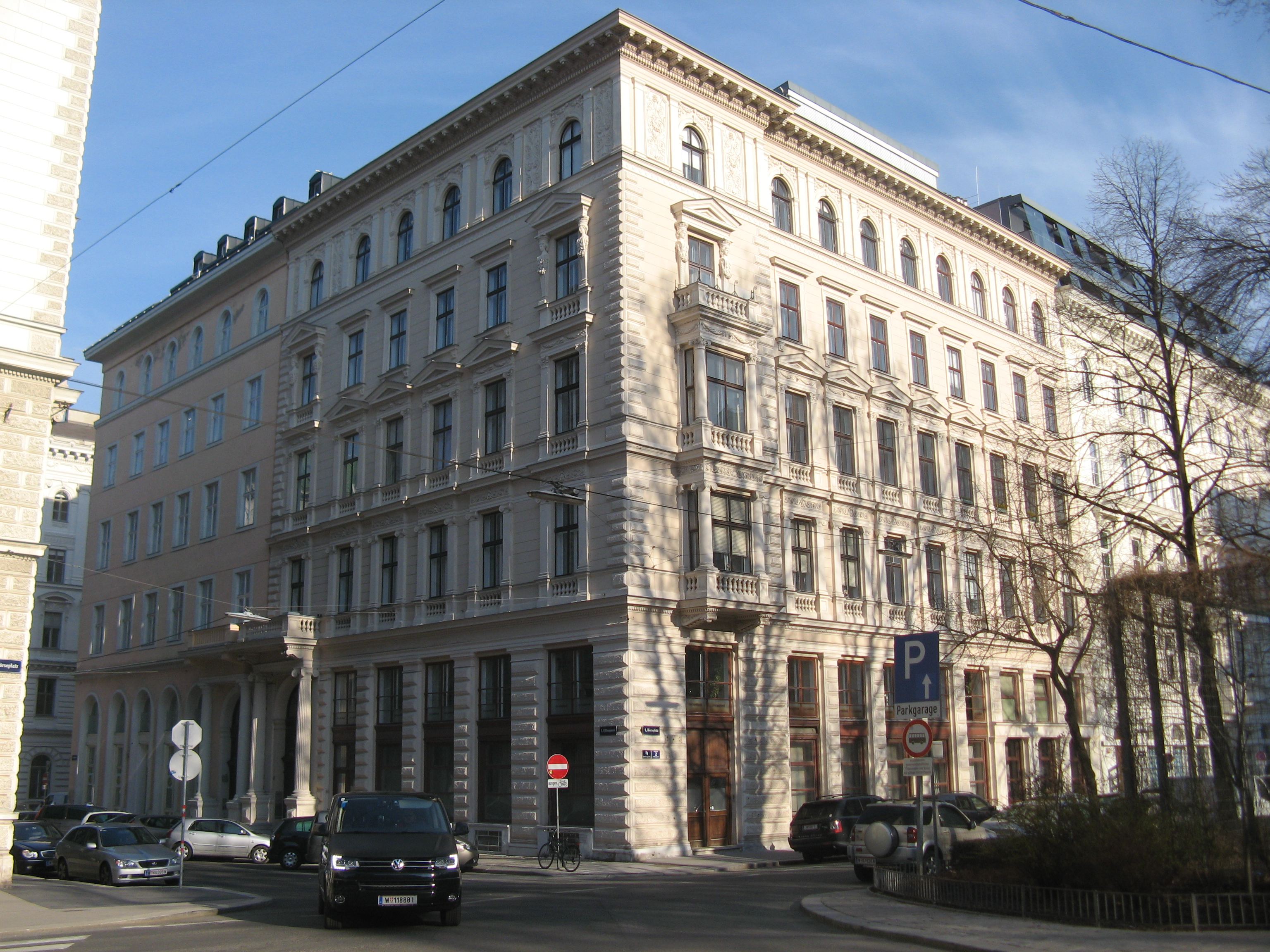 Haus Esslinggasse 2-4 (1871-73) von Julius Dörfel, Wien-Innere Stadt